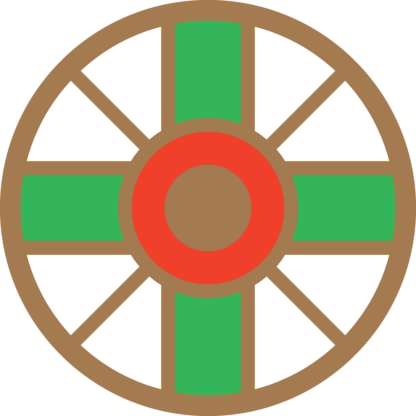 世界救世教ロゴ